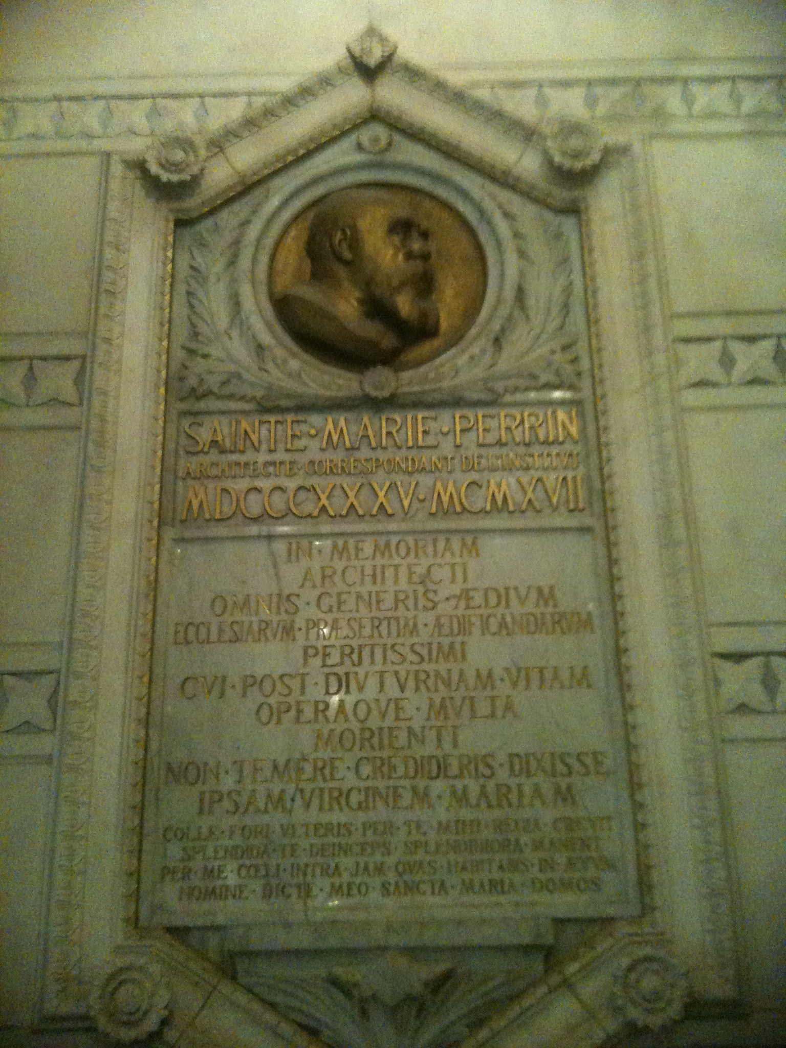 Plaque commémorative de Sainte-Marie Perrin, dans la Basilique Notre-Dame de Fourvière, à Lyon